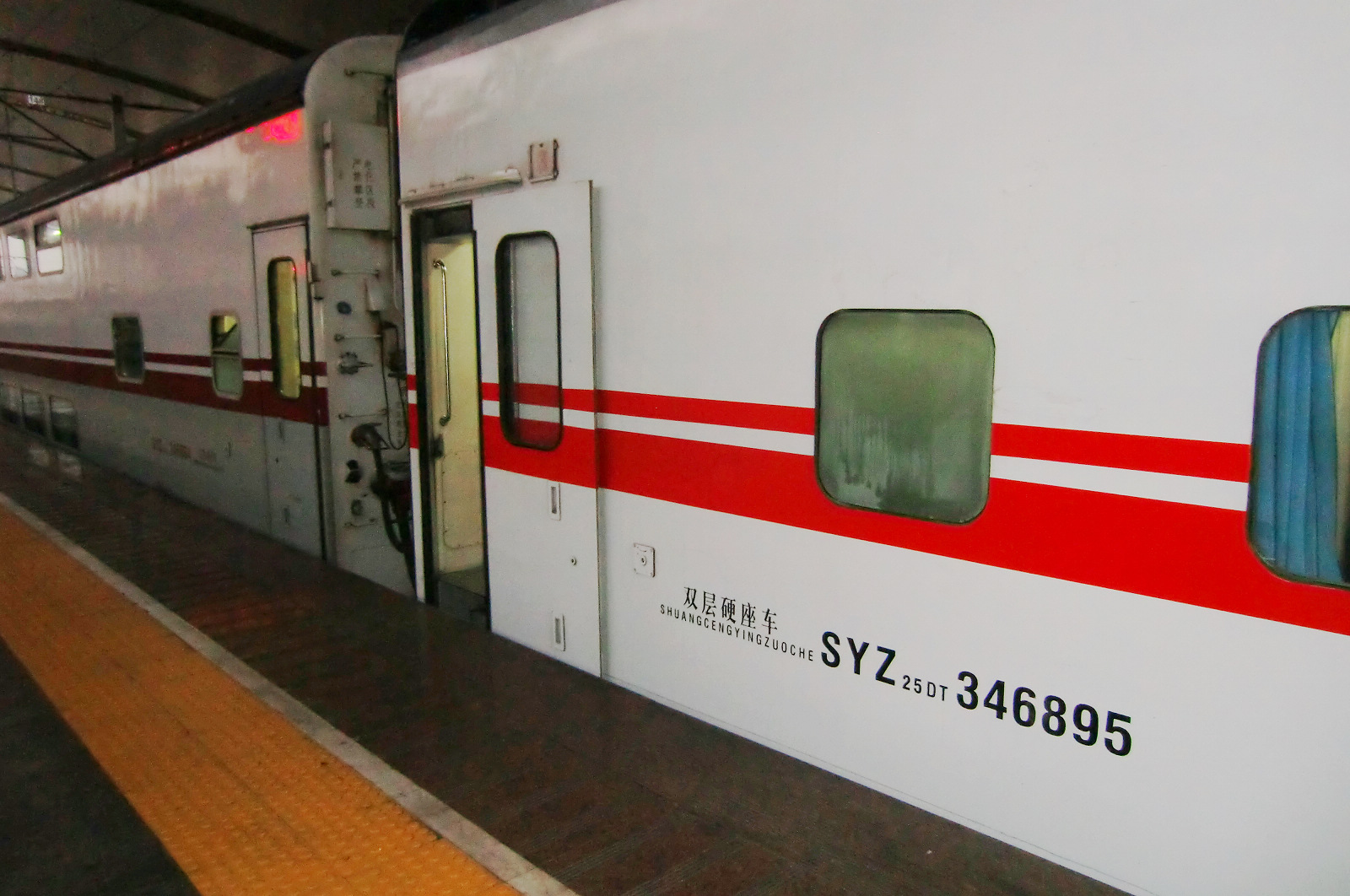 The double-deck passenger car of China Railways NZJ2 "Shenzhou" diesel multiple train